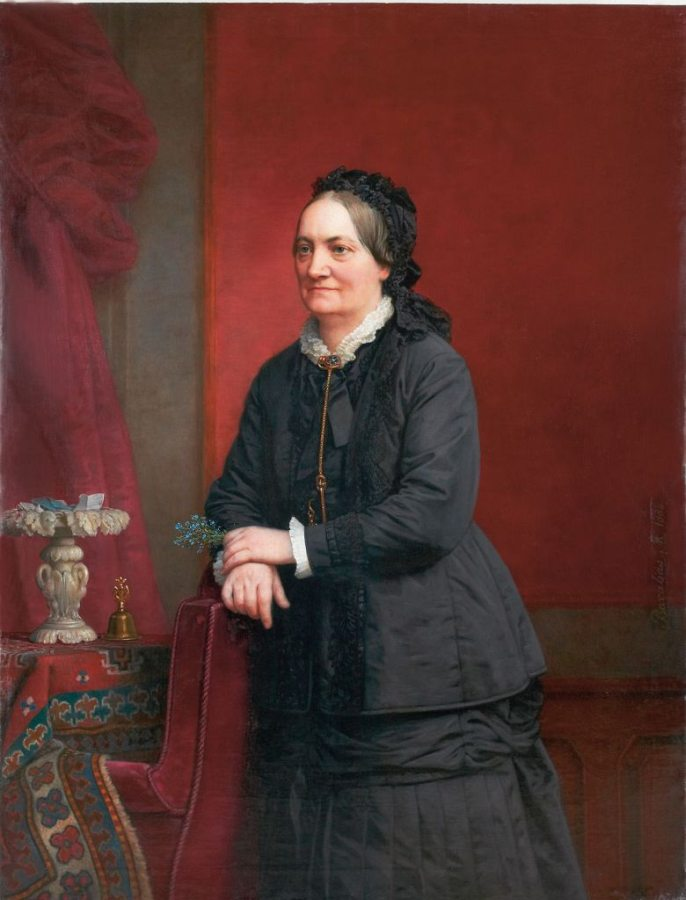 földvári és bernátfalvi Földváry Borbála. Darányi Ignác ügyvéd házastársa, Darányi Ignác földmívelésügyi miniszter édesanyja.